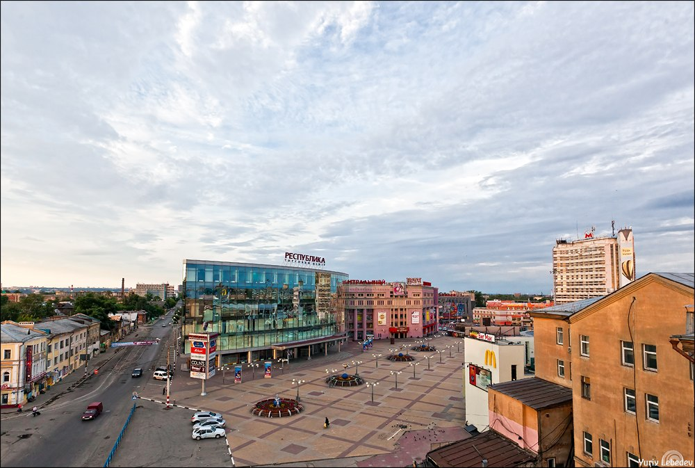 Площадь Революции в Нижнем Новгороде